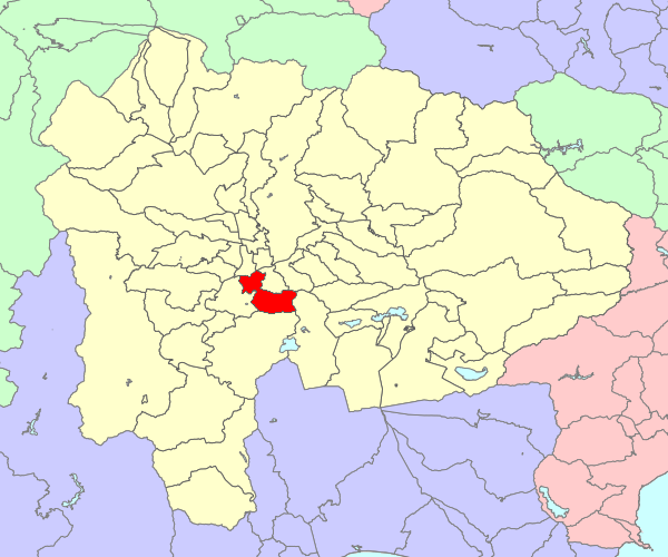 山梨県西八代郡三珠町の位置画像。